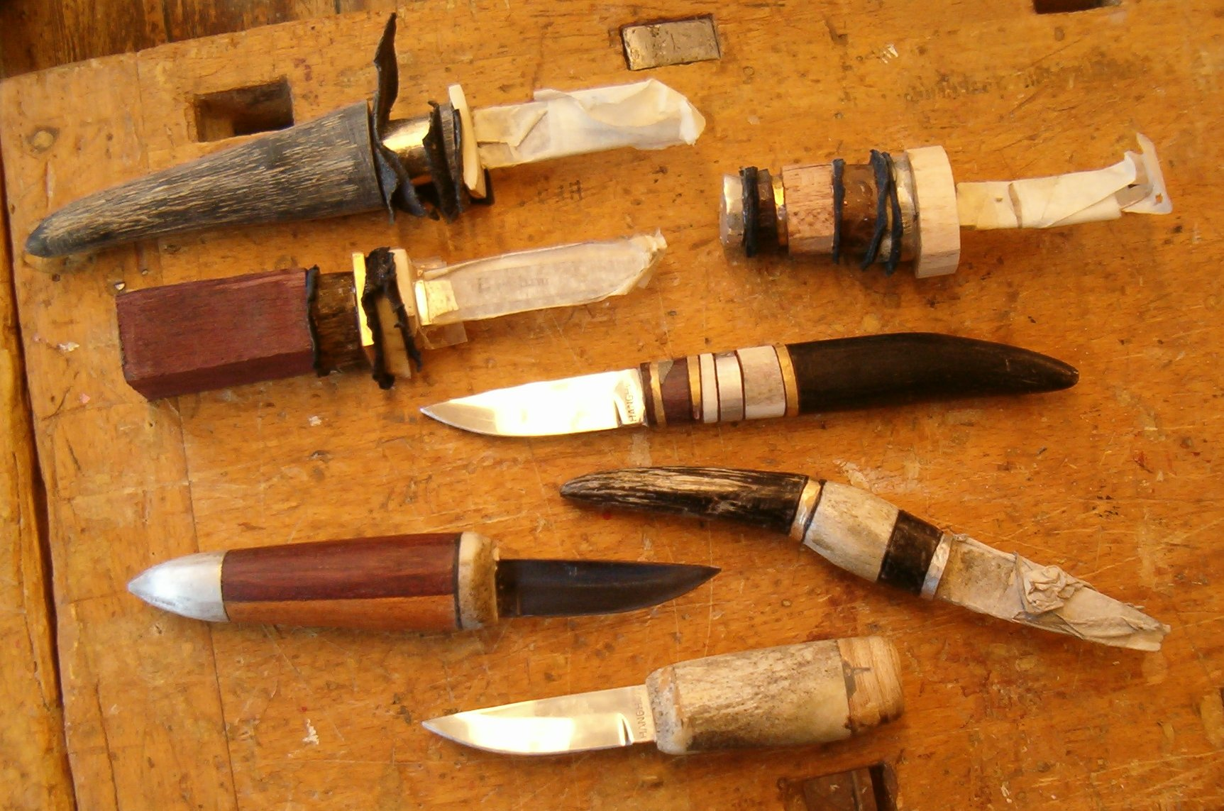 Syv knive, der er i gang med at blive fremstillet som individuelle "kunstværker" i mit sløjdlokale, klingerne færdigkøbte, skæfterne sammenlimet af forskellige træsorter, metal, horn, tak, ben, læder etc.